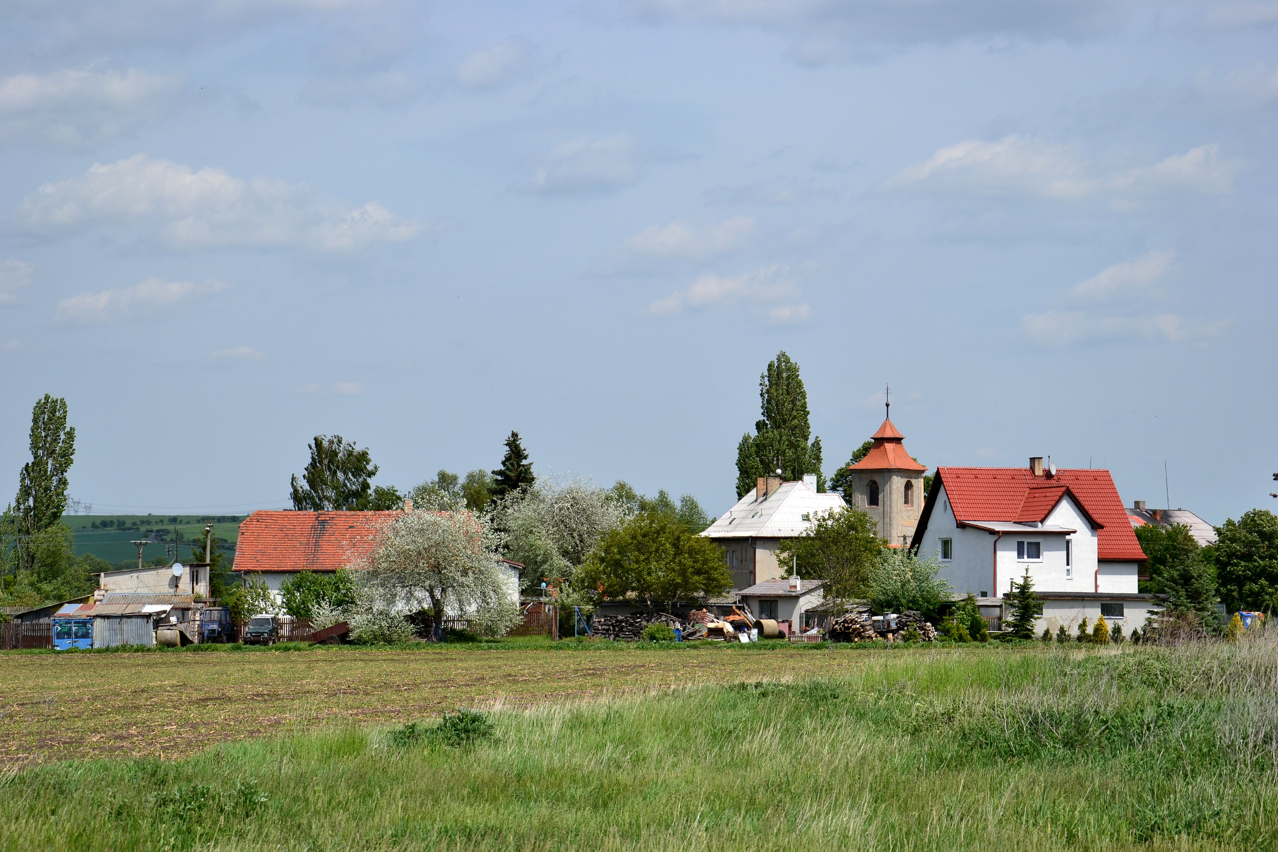 Celkový pohled na vesnici